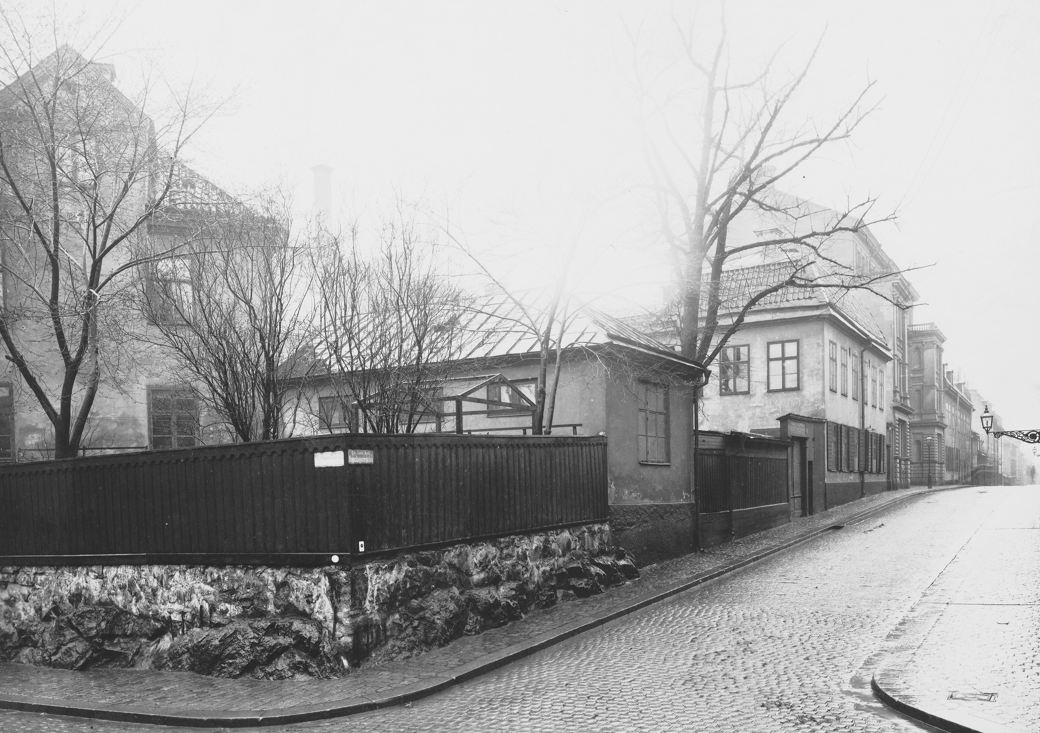 Kvarteret Göta ark (dagens Noe ark) sett från Högbergsgatan mot norr. T.h. Repslagargatan.